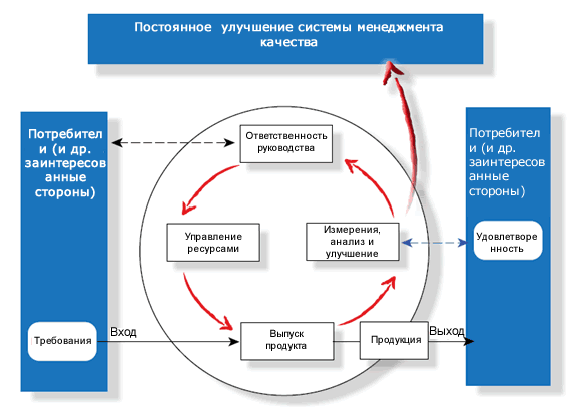 Процессный подход согласно ISO 9000